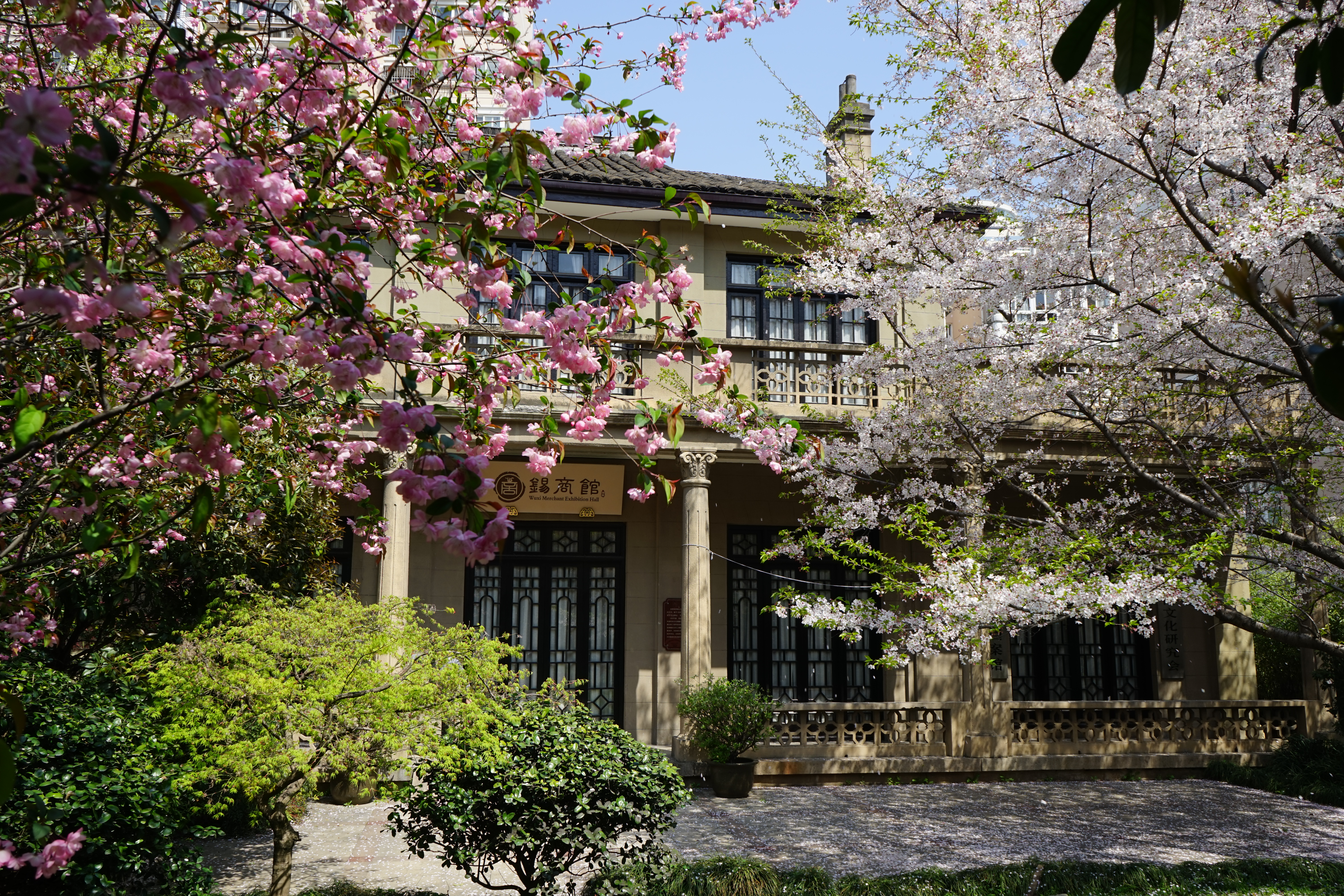 本是荣德生女婿李国伟的住宅，建于1928年。1946年起荣德生住在此处知道1952年逝世。1989年夏李国伟的子女将本宅捐给无锡市人民政府，市政府接收后交市工商联使用，并拨款修缮。2006年6月列为江苏省文物保护单位。2008年工商联将其辟为锡商馆。